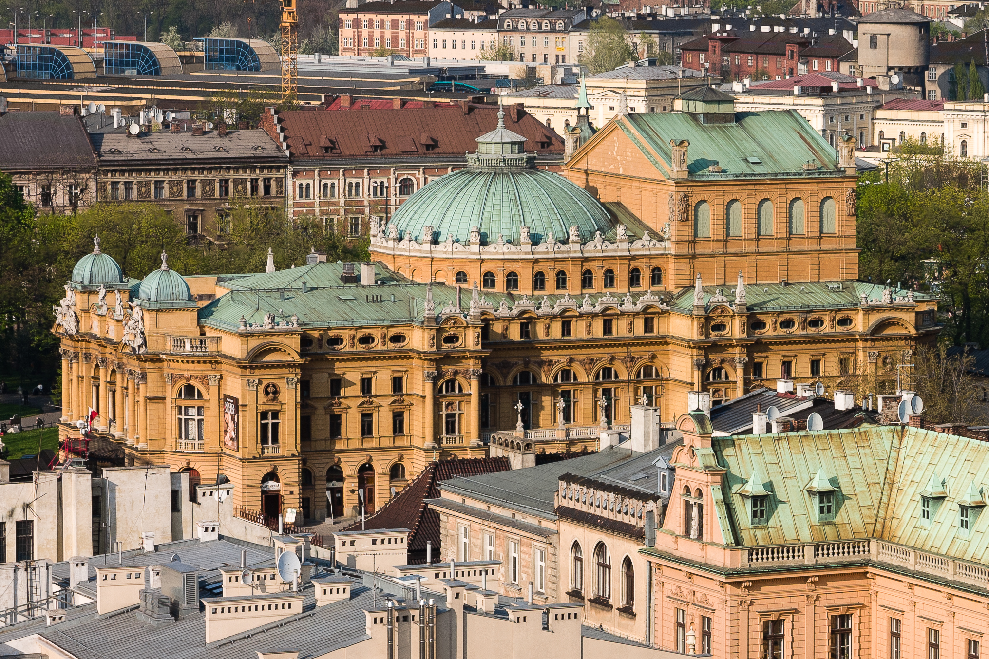 Teatr Miejski im. Juliusza Słowackiego